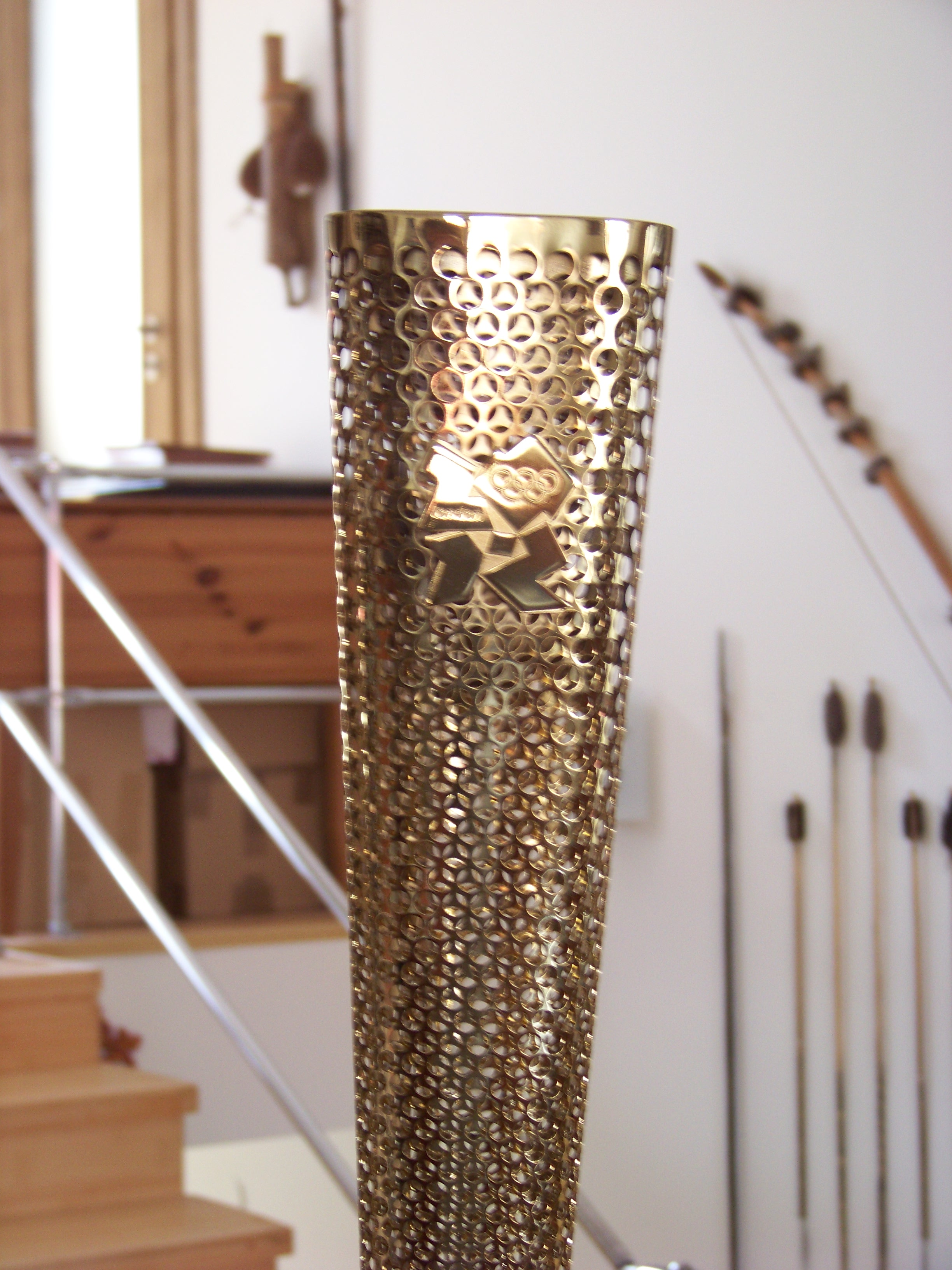 Pochodnia Olimpijska Letnich Igrzysk Olimpijskich Londyn 2012